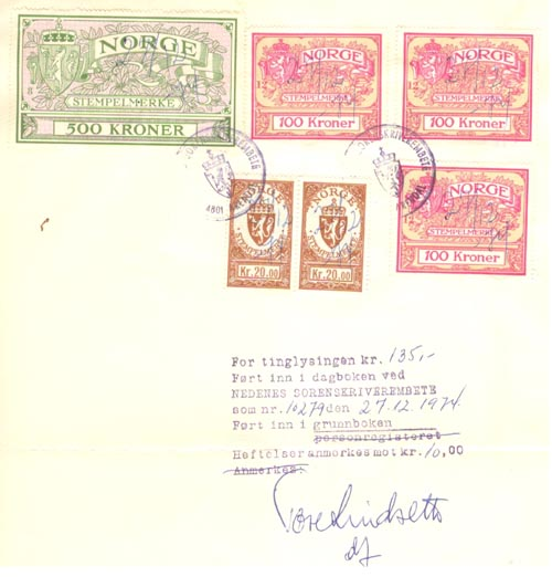 Eldre skjøte, side 2